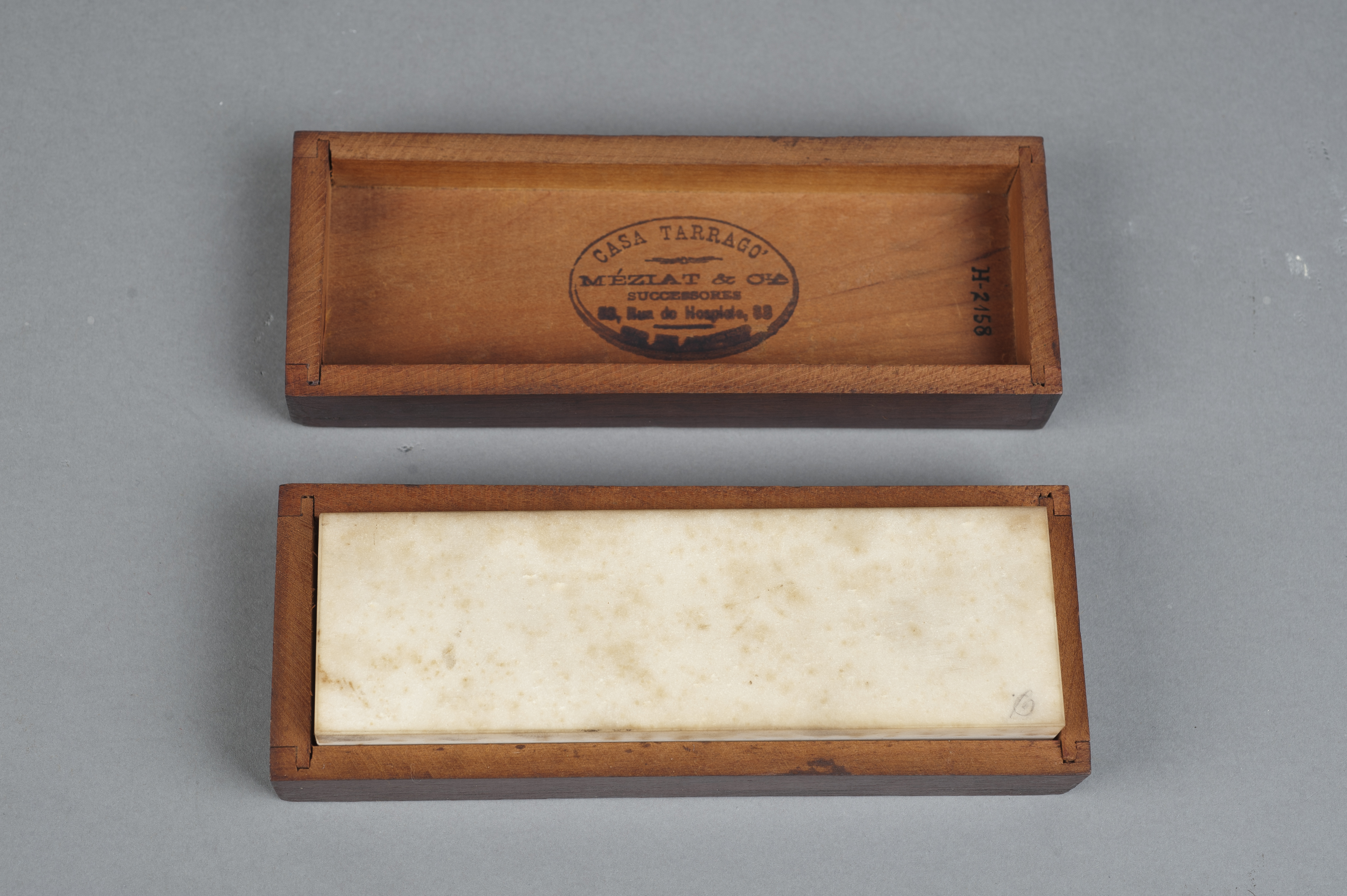 Instrumento de bancada mecânica. Estojo de madeira com pedra de afiar fixa no estojo. Inscrições: "Casa Tarrago - Meziat & CIA R. do Hostpital, 83 - RJ.".Pertenceu à Alberto Santos Dumont (1873-1932).